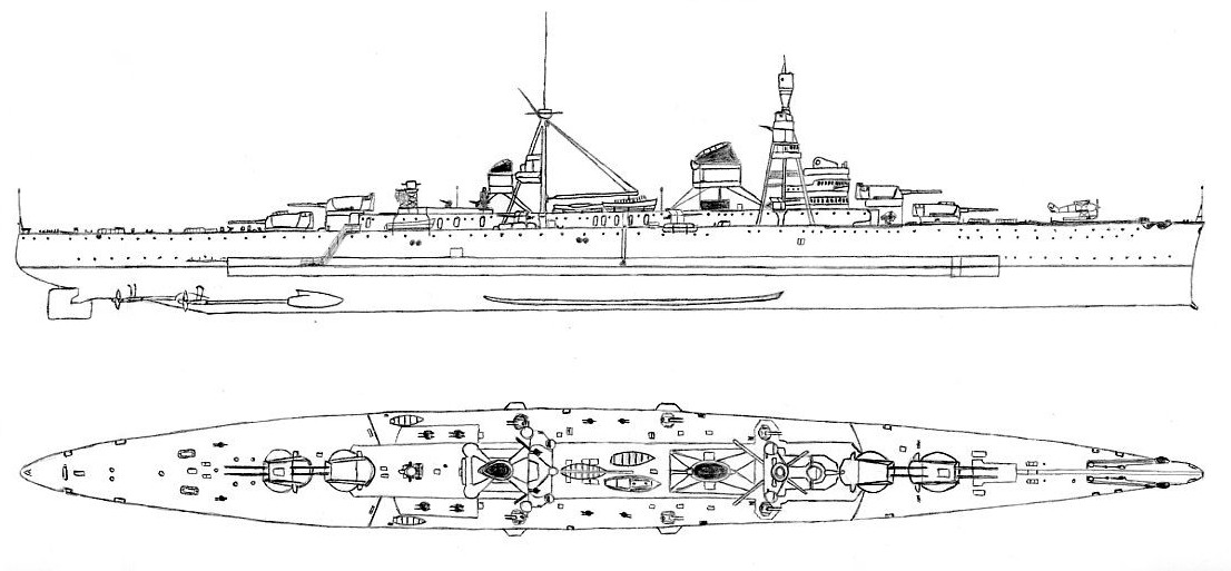 Тяжелый крейсер типа Тренто, схема.